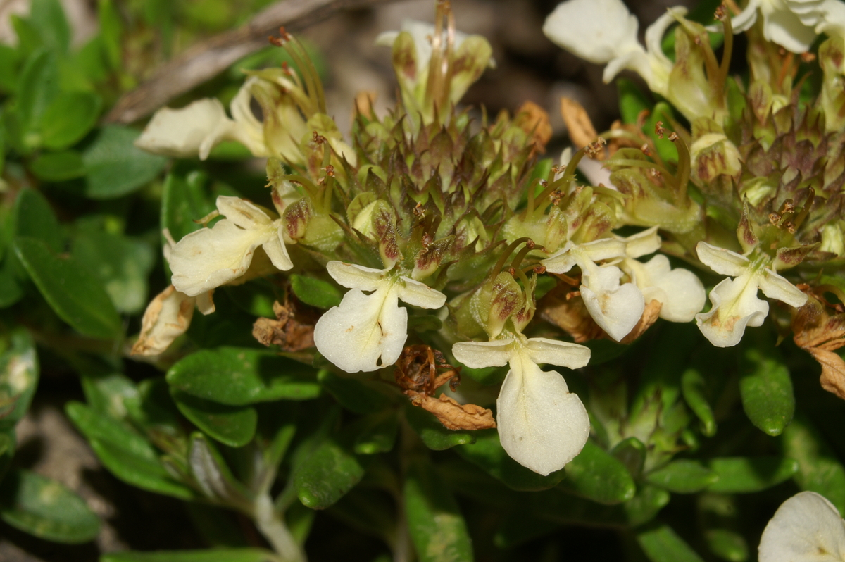 Gorski vrednik v Jereki.